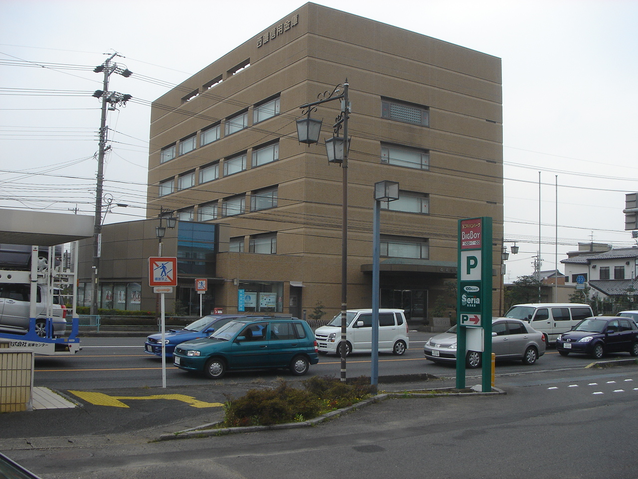 SeinoShinyoKinko Honbu(西濃信用金庫本部),Mizuho,Gifu,Japan(岐阜県瑞穂市)で撮影